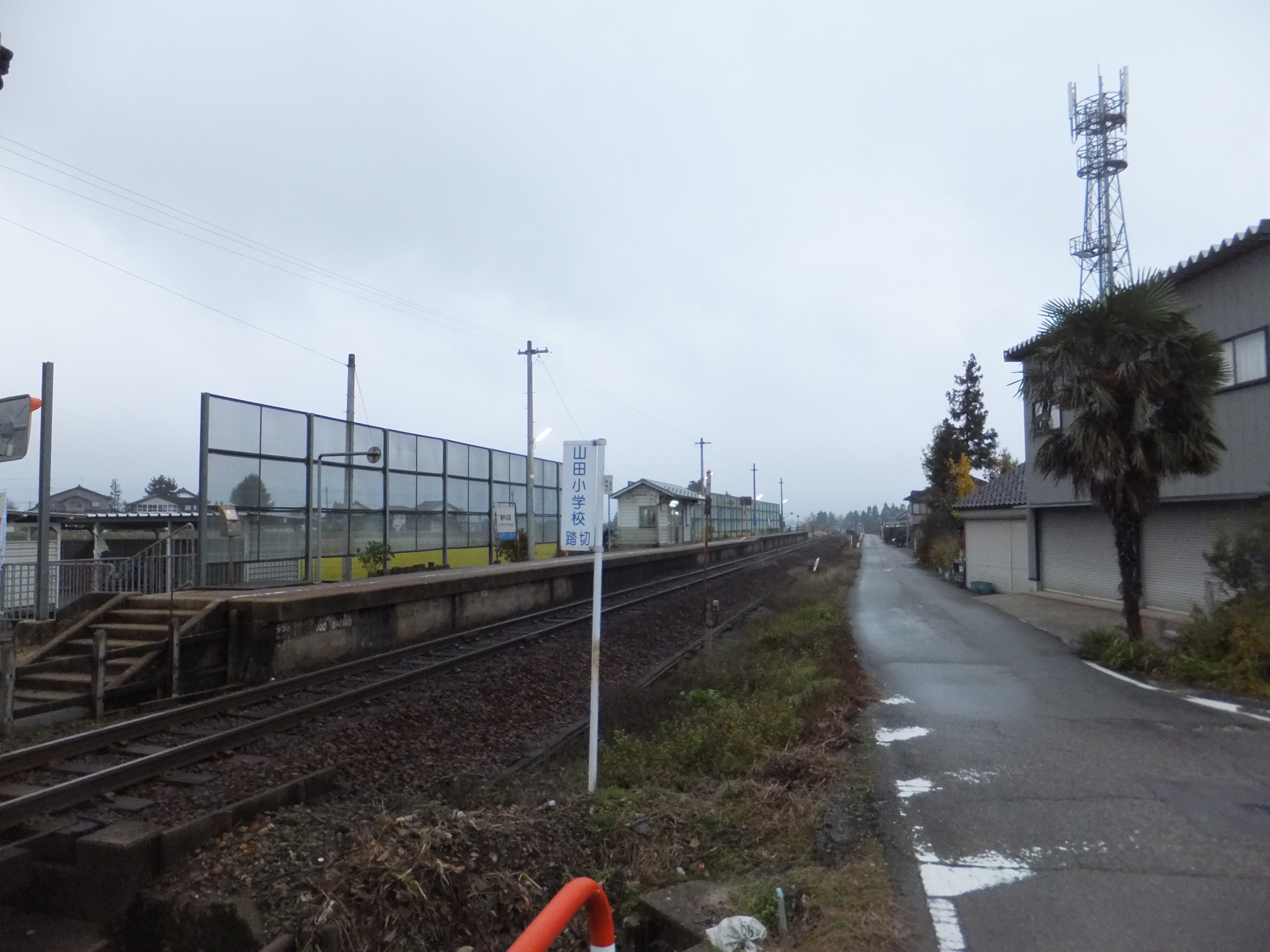 Takebayashi, Nanto, Toyama Prefecture 939-1734, Japan